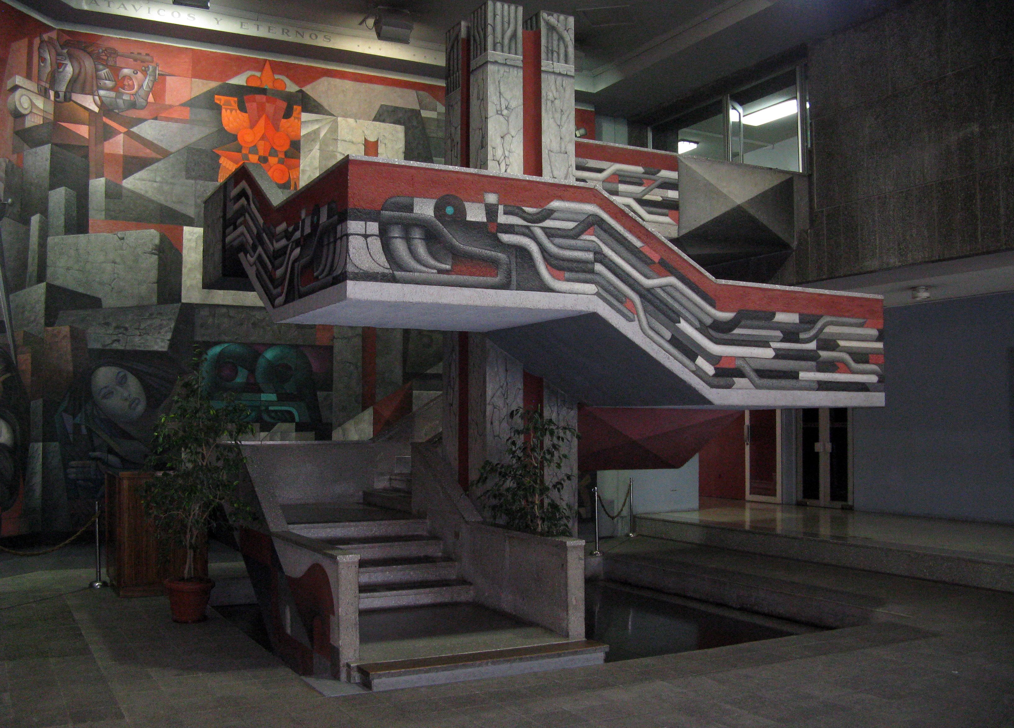 Parte del mural "Presencia de América Latina", ubicado en la Casa del Arte, Universidad de Concepción, Chile This is a photo of a national monument in Chile: 2120